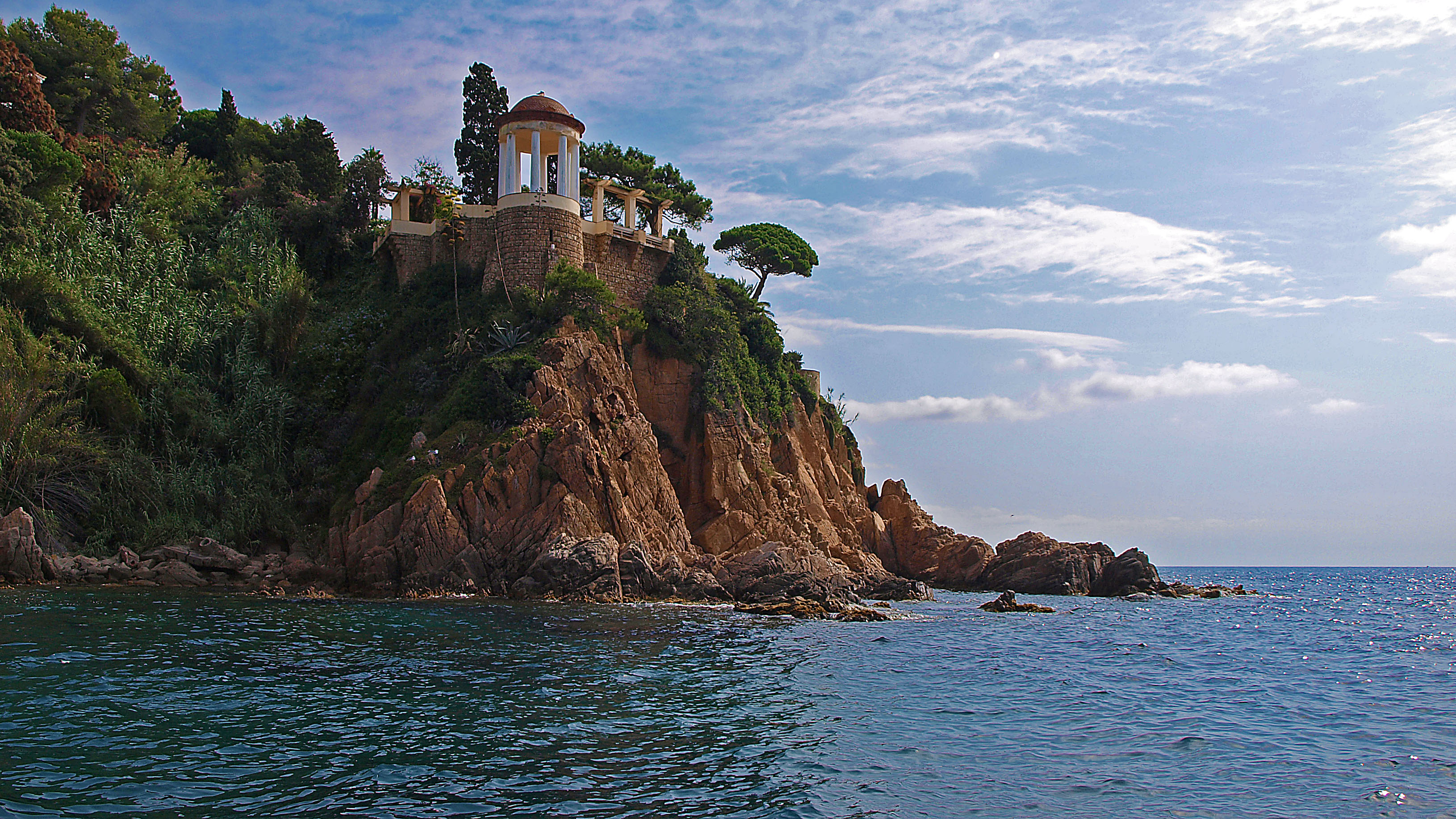 Jardín Botánico Marimurtra, Blanes, Girona